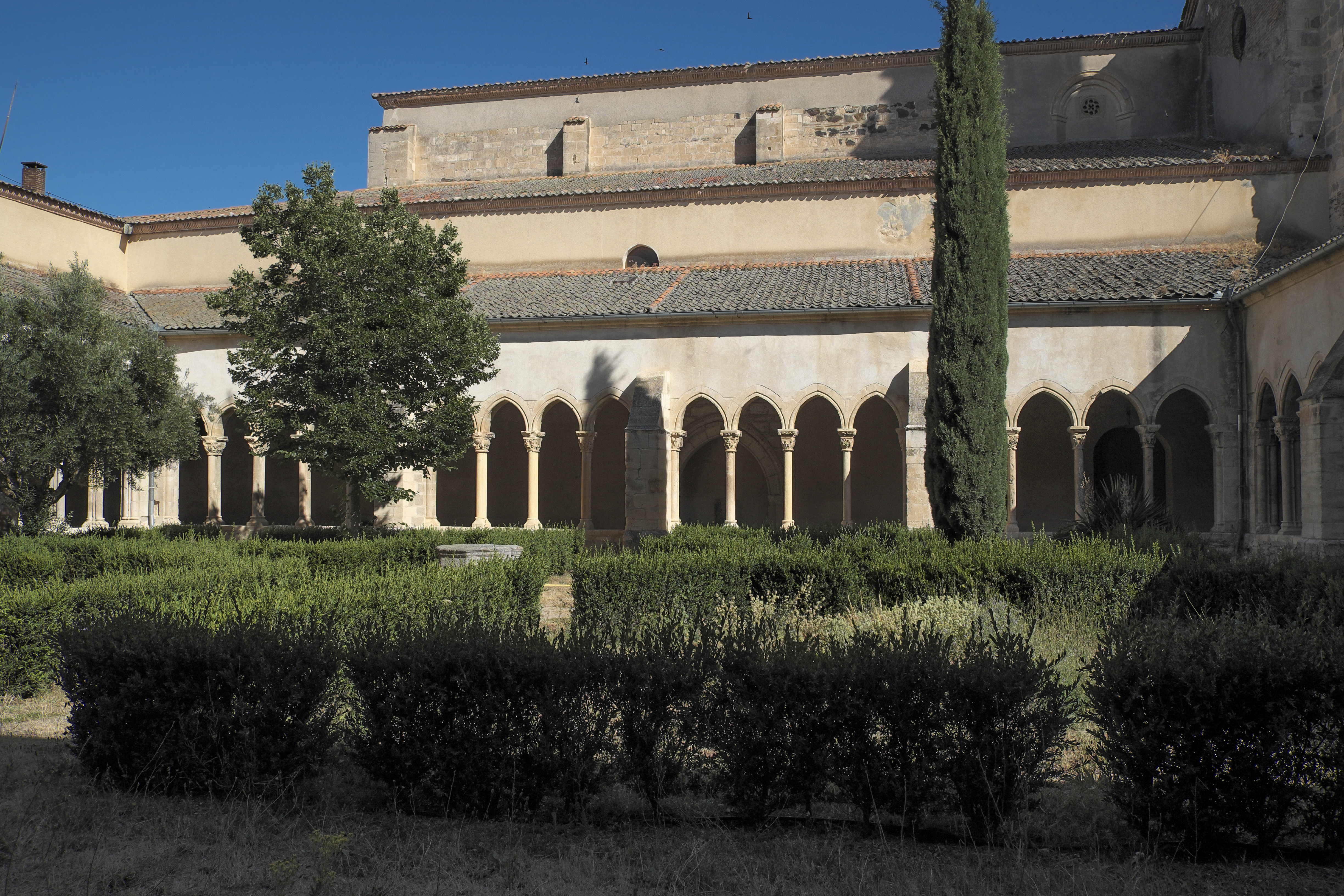 Kreuzgang des ehemaligen Dominikanerklosters in Santa María la Real de Nieva in der Provinz Segovia (Kastilien-León/Spanien)